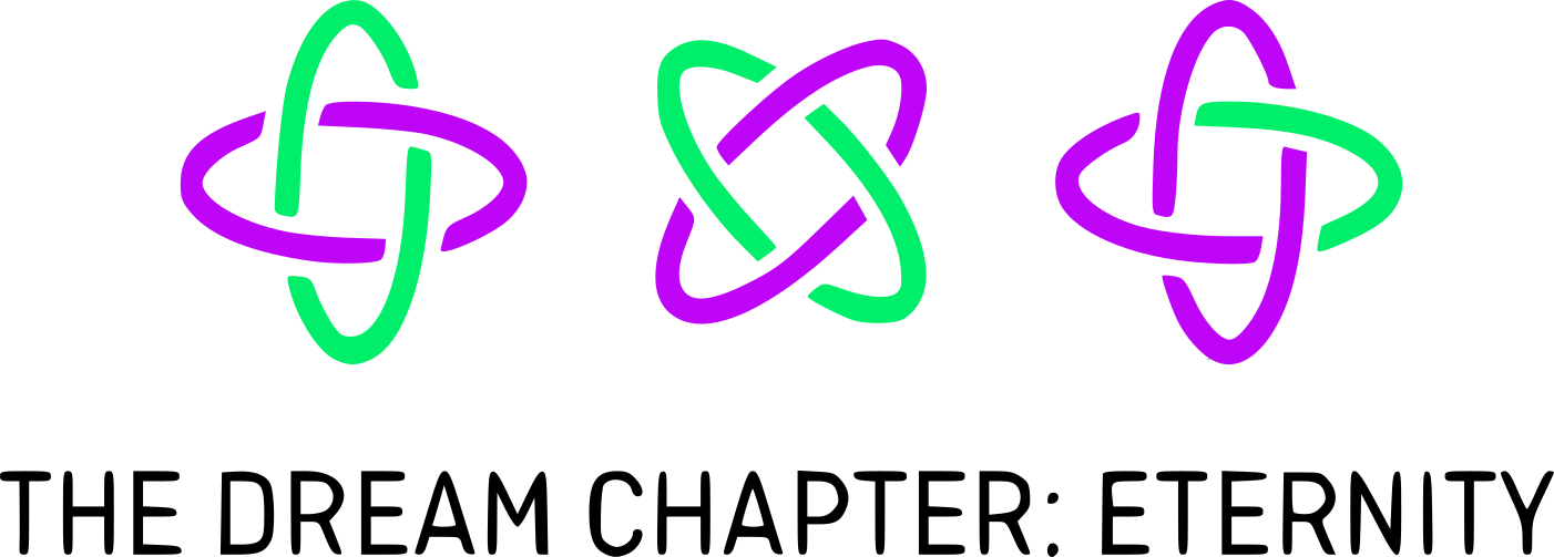 Logo del álbum The Dream Chapter: Eternity del grupo TXT.